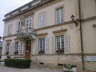 photo de la mairie du village de Givonne